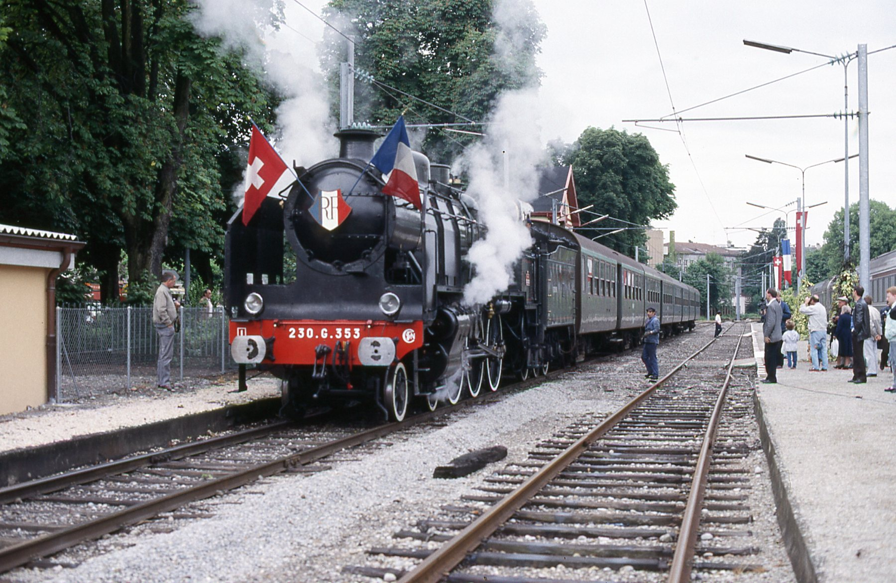 Photo: Trams aux Fils. Gare des Eaux-Vives, le 28 mai 1988, jour du centenaire de la ligne.